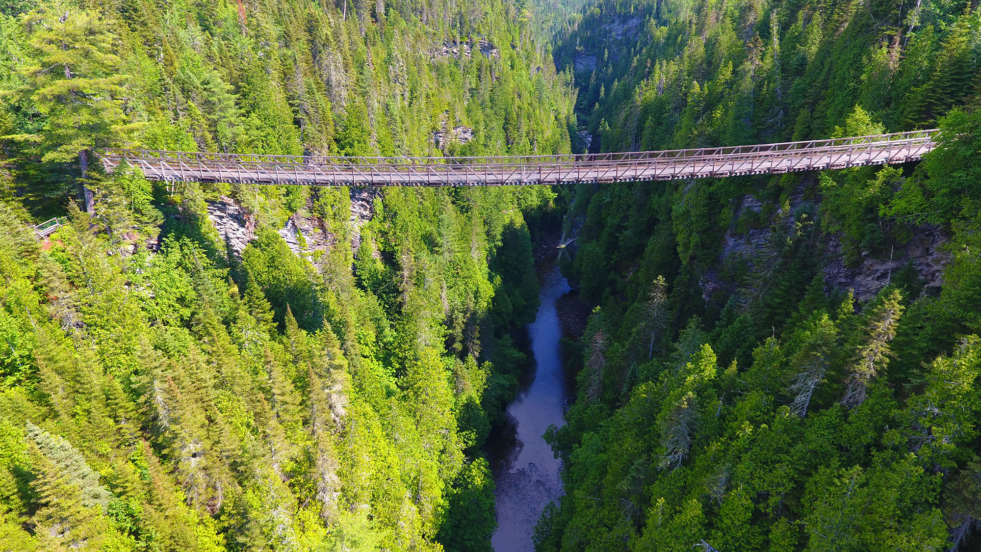 Vue aérienne de la passerelle du Canyon des Portes de l'Enfer, la plus haute passerelle suspendue au Québec (2017), haute de 63 mètres.